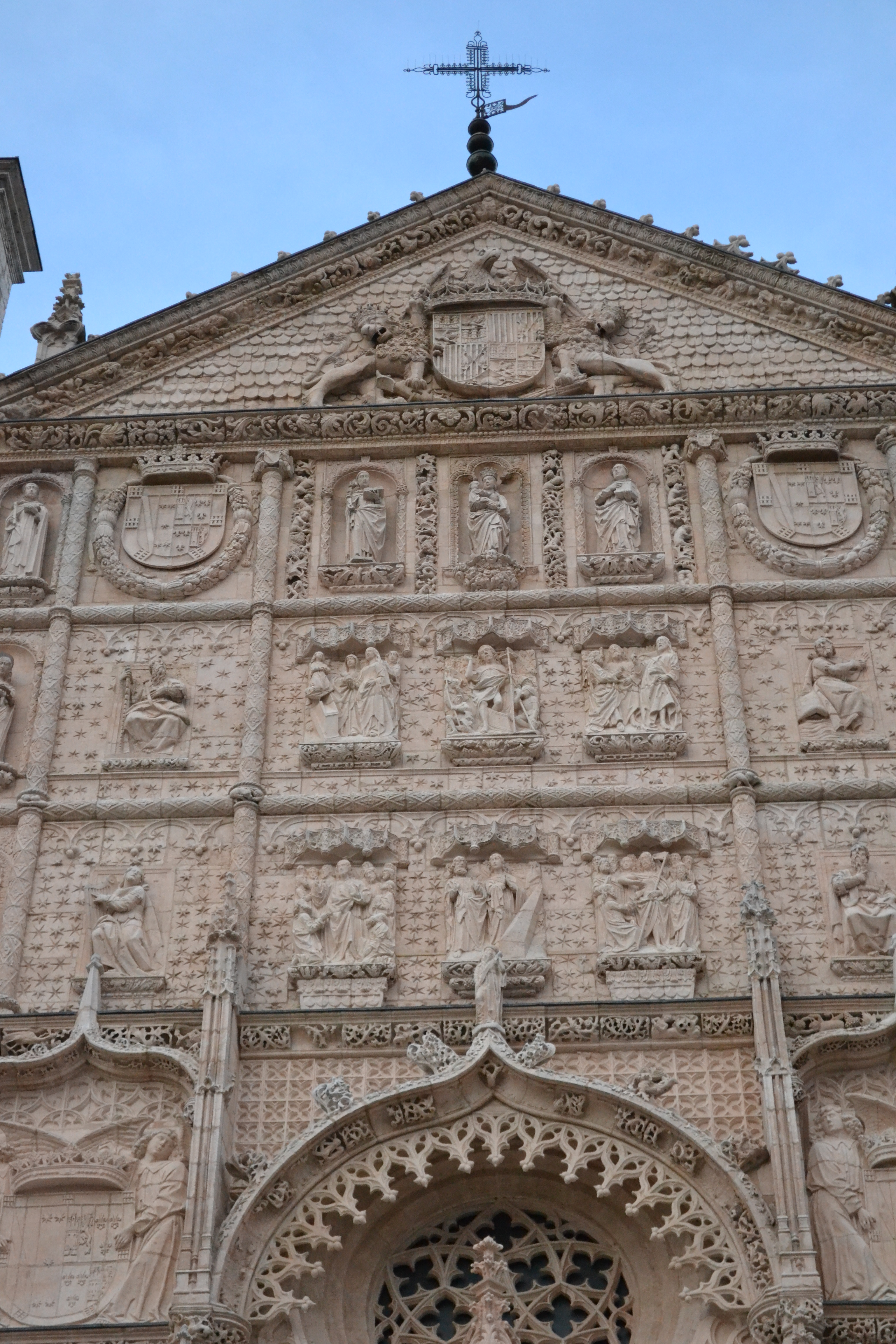 Fachada en la Iglesia conventual de San Pablo (Valladolid).